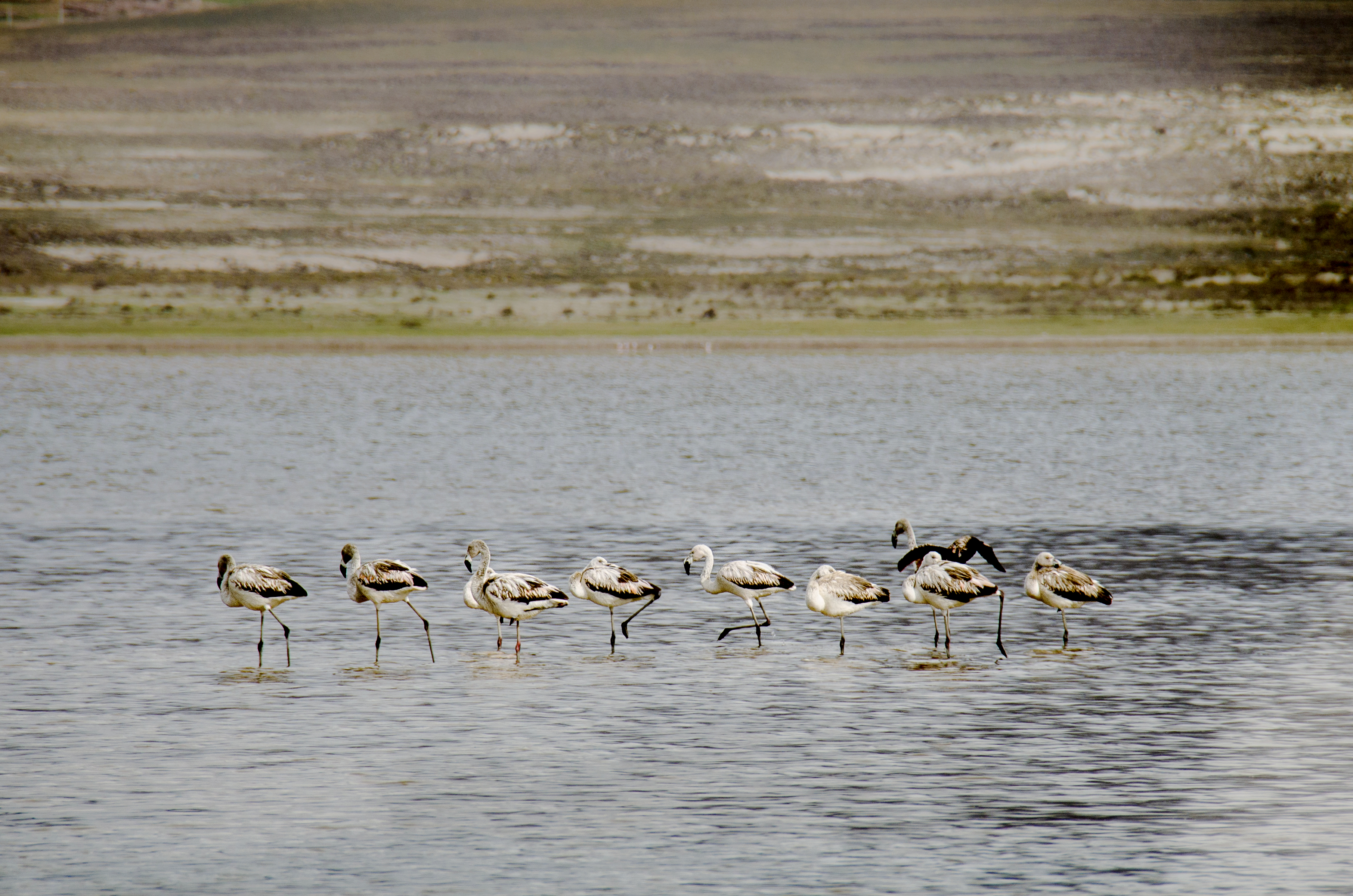 En el altiplano tarijeño se encuentran las lagunas de Tajzara y Pujzara, el espacio perfecto para el encuentro con un increíble paisaje en este, hoy por hoy, desolado paraje